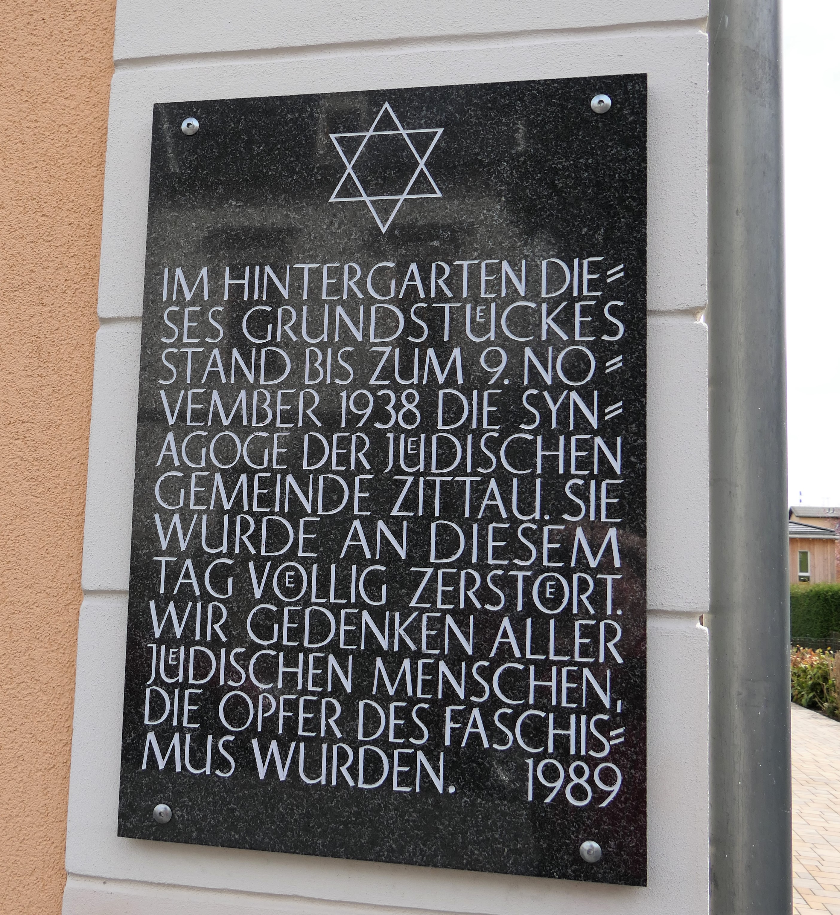 Gedenktafel für Synagoge Zittau, Lessingstraße 12